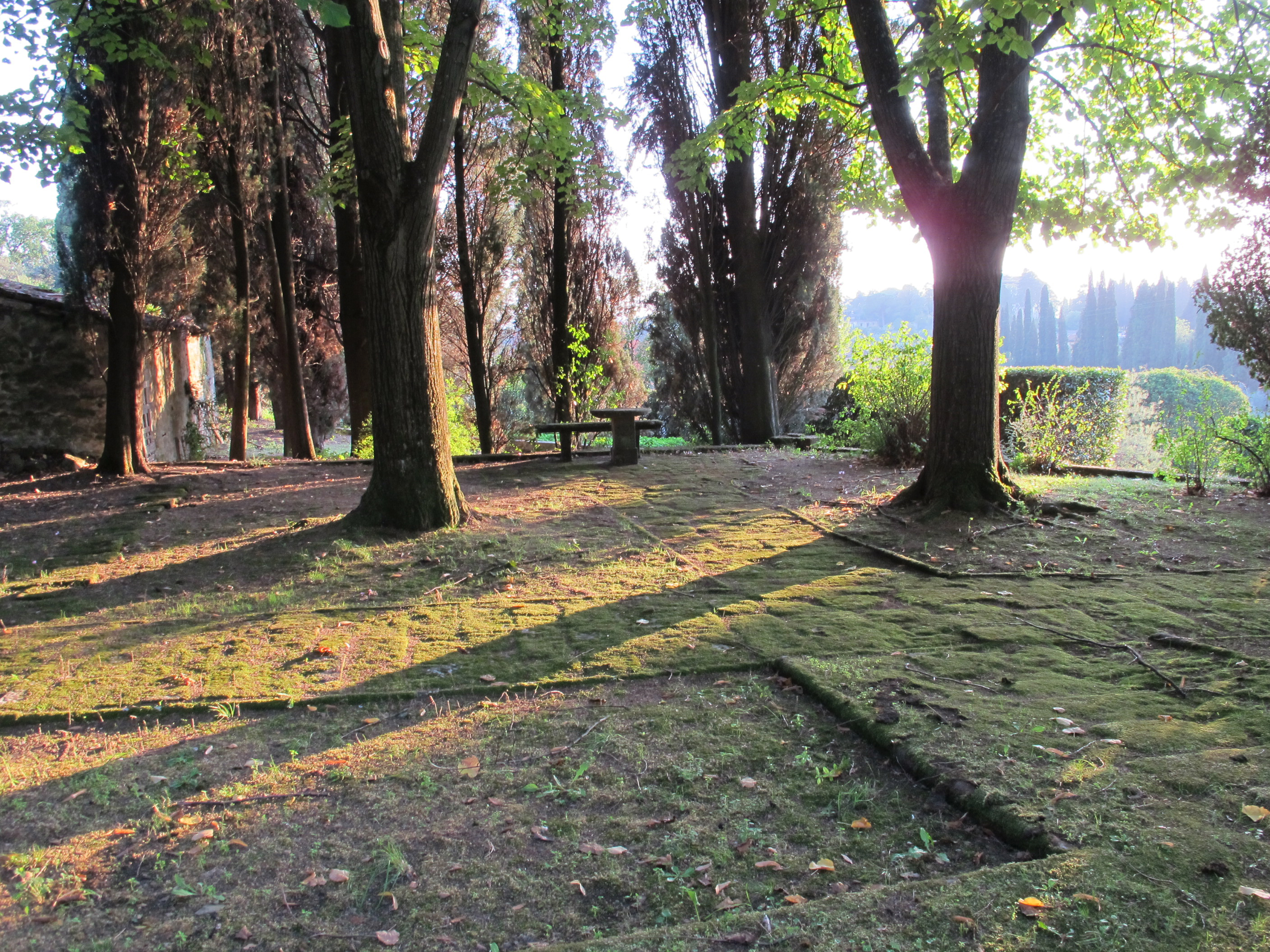 Villa sparta, parco, piscina rasoterra, vialetti con muschio